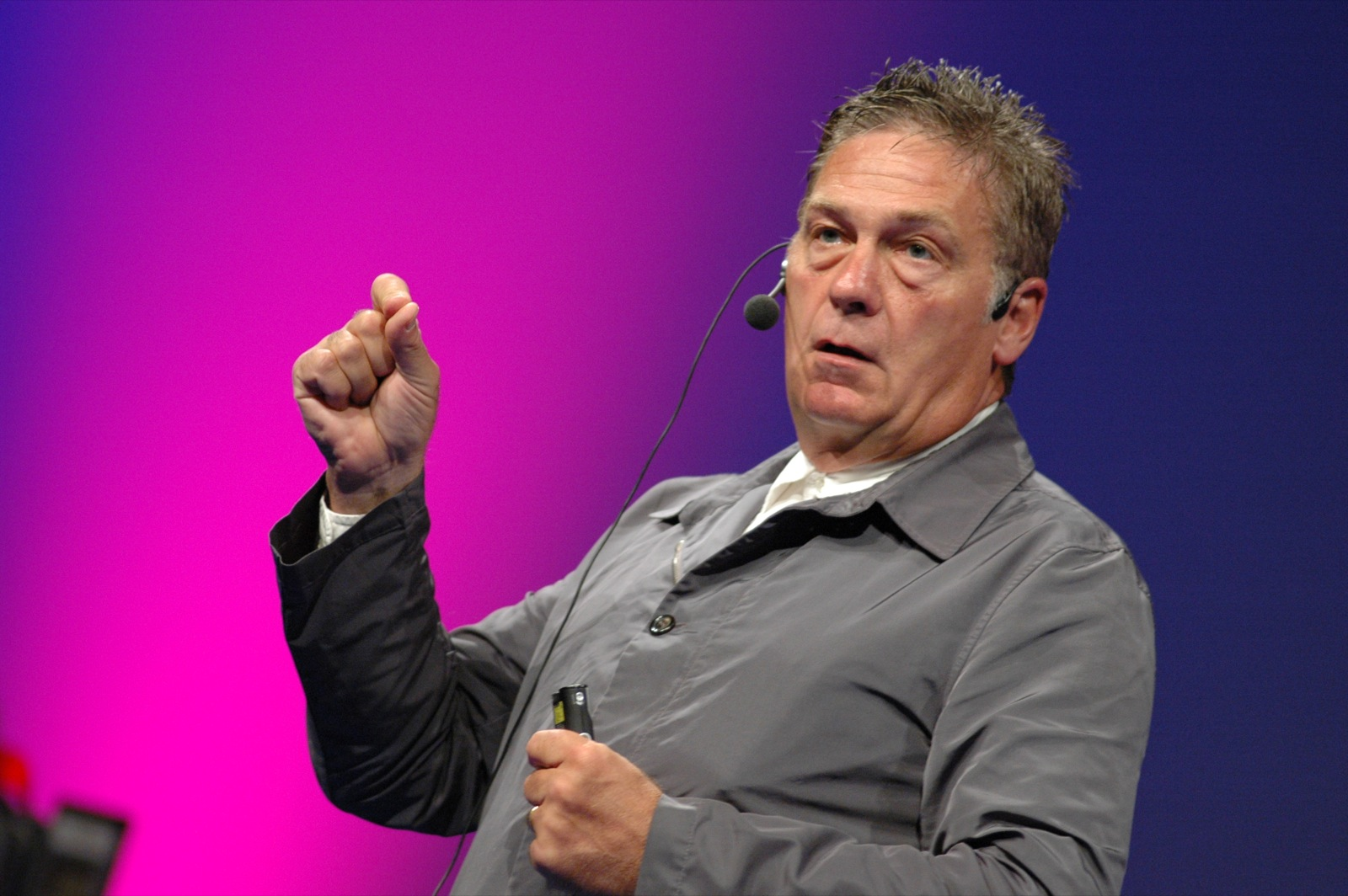 by